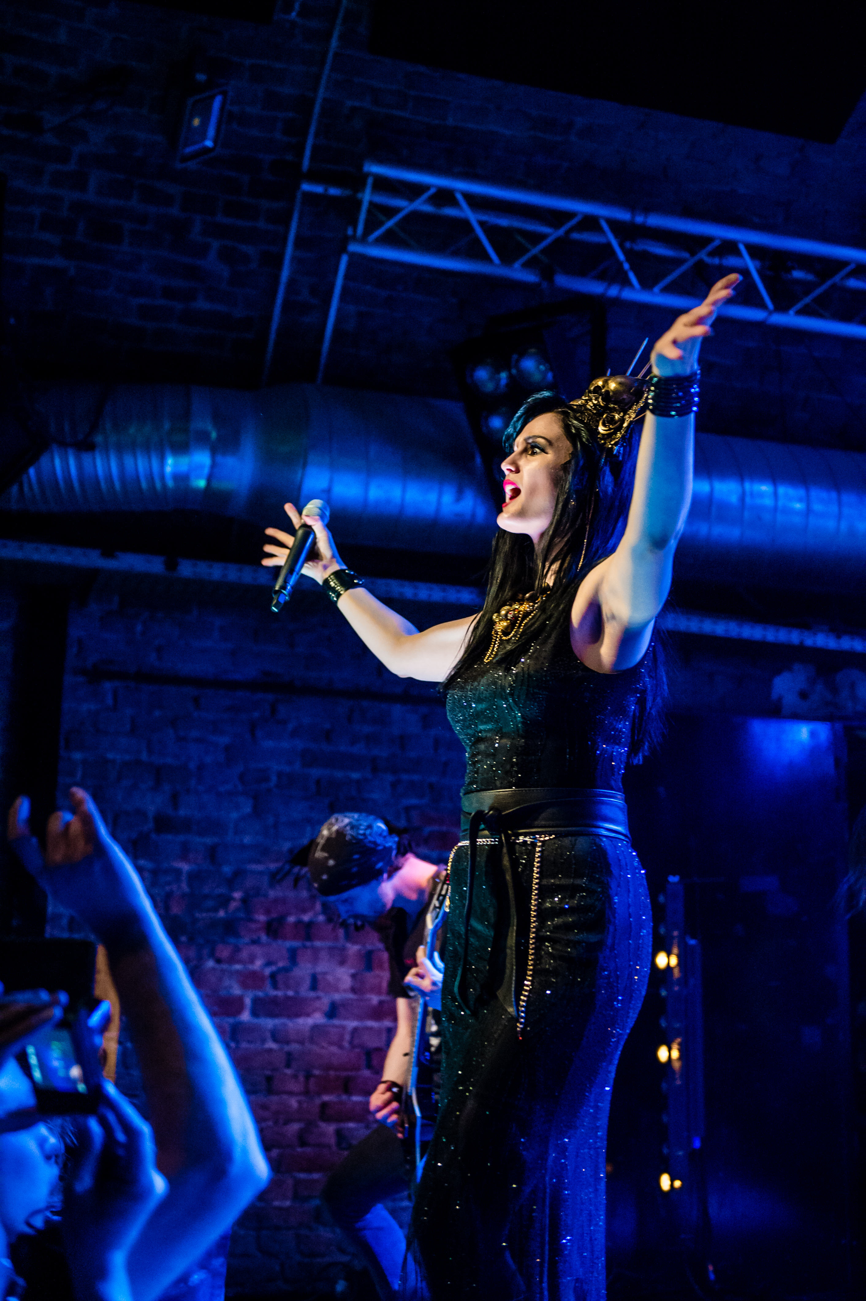 'Xandria 'Symphonic Metal Nights' Tour - Bochum Matrix'